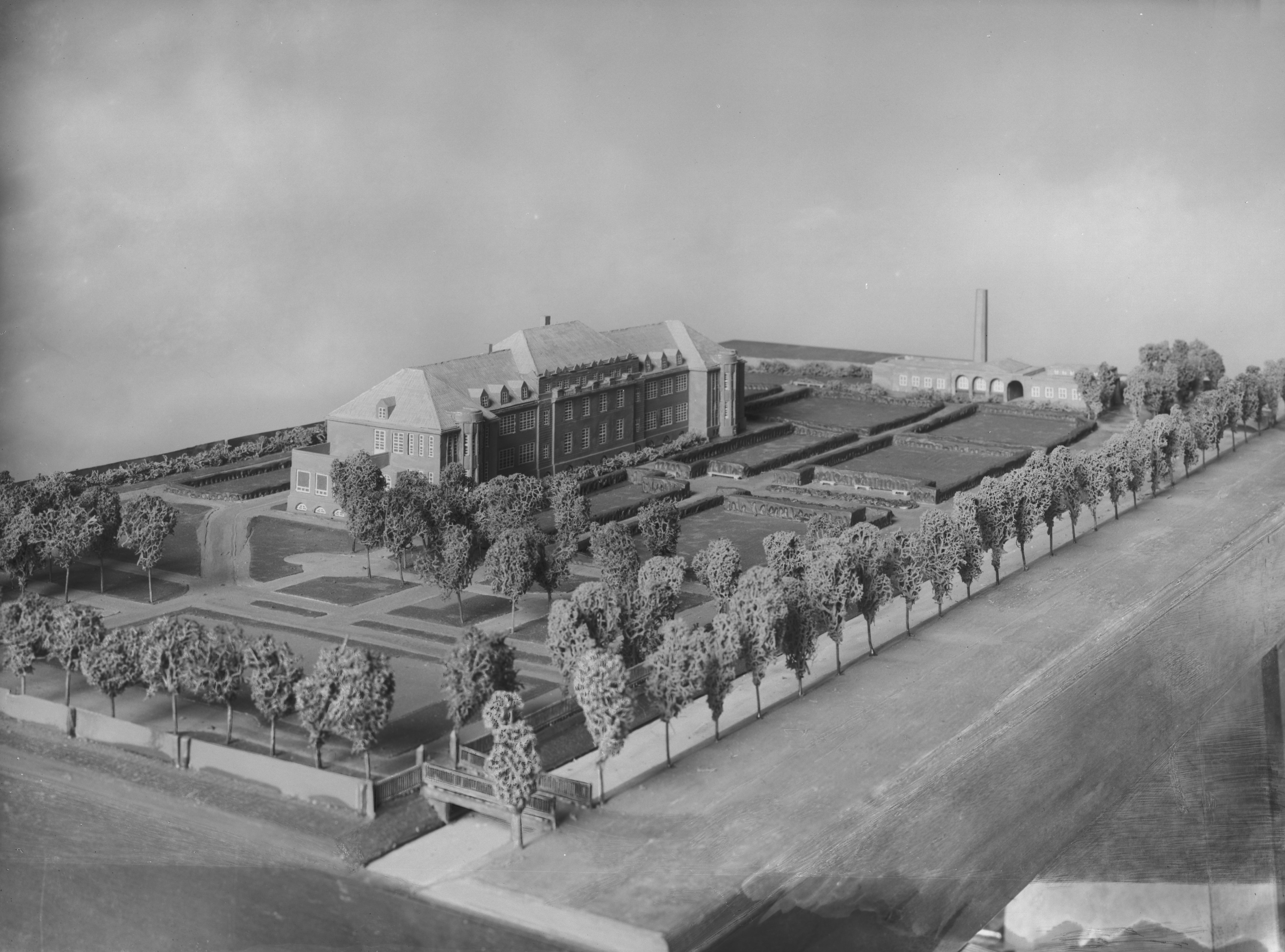 Krankenhaus Cuxhaven [Staatskrankenhaus Cuxhaven] (Cuxhaven): Modell SchumacherWV Nr. 235